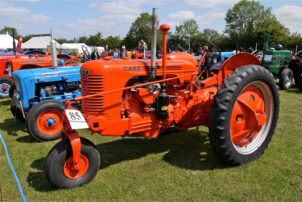 Panasonic G1 14-45 Lens